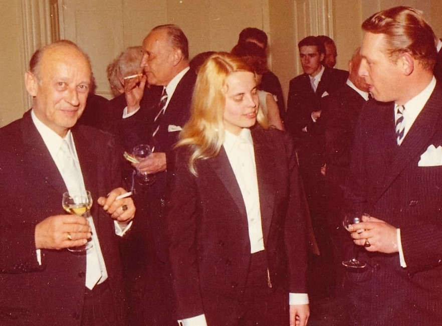 Mariano Freiherr Droste zu Hülshoff (links) mit Hortense von Gelmini (Mitte) und Carl Fürst zu Wied 1970 (rechts) 1970 in Neuwied